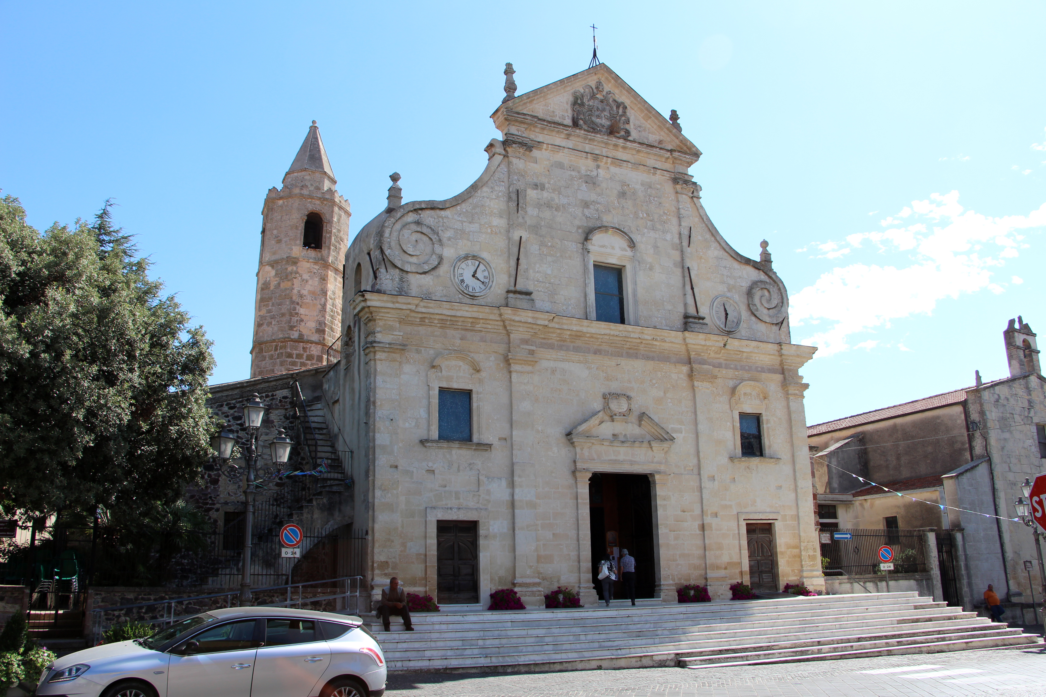 Ploaghe, SS